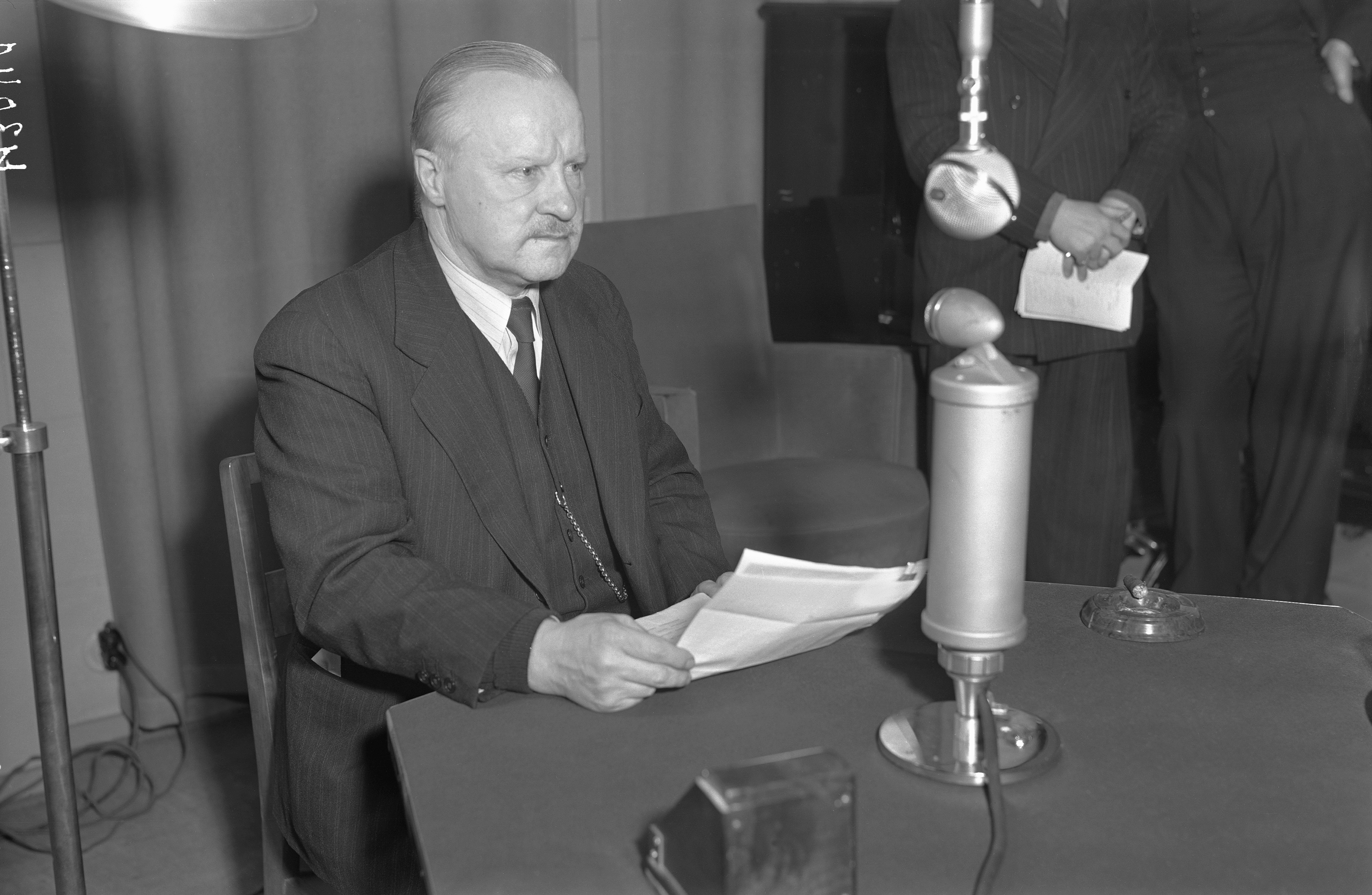 Ulkoministeri Väinö Tanner lukee Talvisodan päättäneen Moskovan rauhan ehdot 13.3.1940